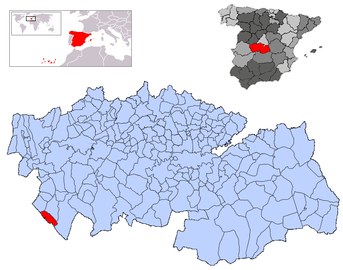 Puerto de San Vicente en la provincia de Toledo